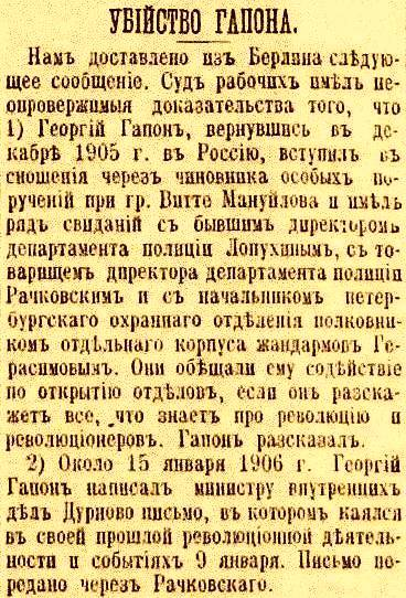 Фрагмент статьи "Убийство Гапона" из газеты "Новое время" от 19 апреля 1906 года